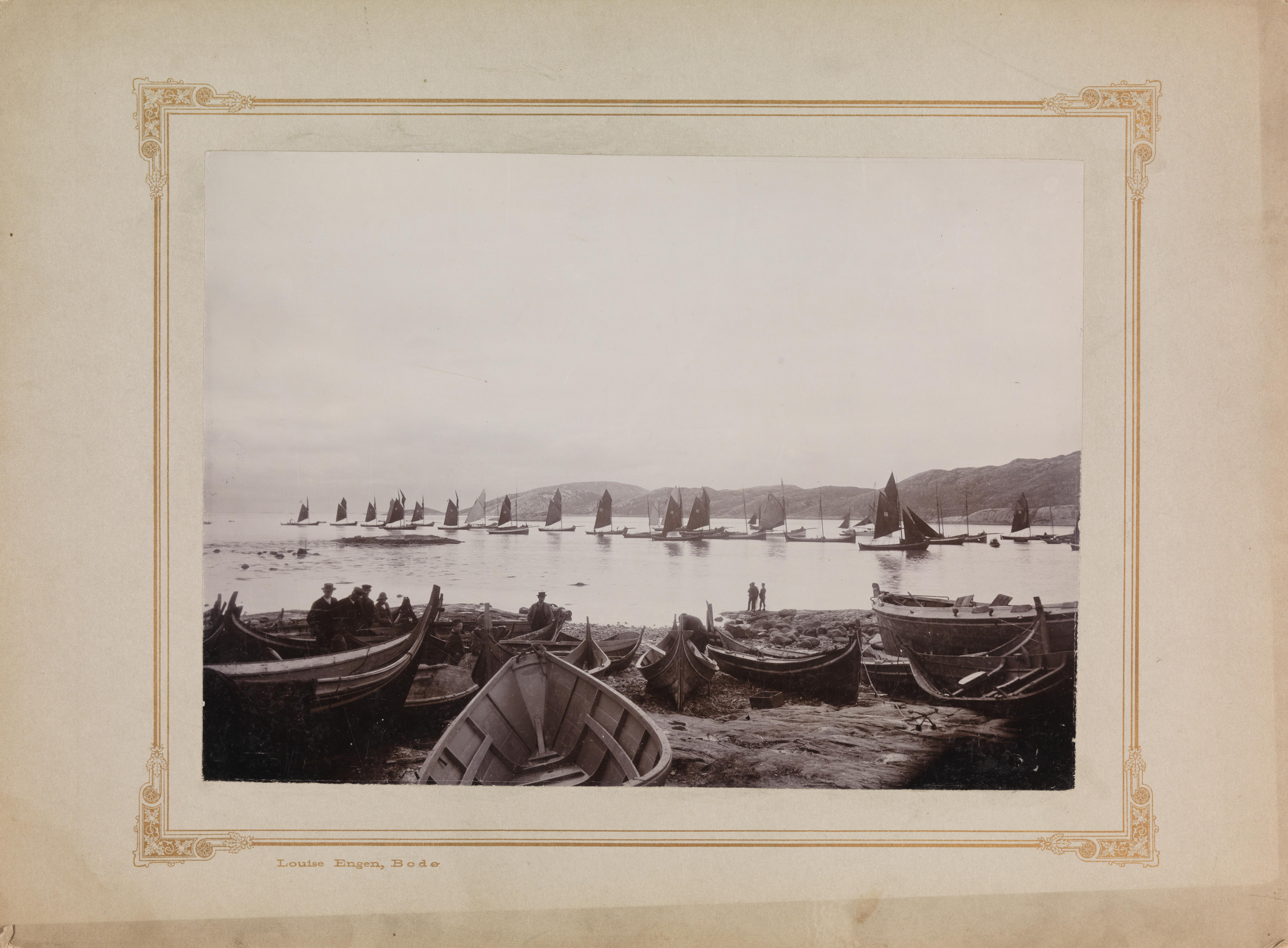 Bildet er hentet fra Nasjonalbibliotekets bildesamling. Anmerkninger til bildet var: #Ekstern kommentar: Bodø. Fotografen står antageligvis på Falckodden eller nedenfor Grand hotell og skjæret til venstre er der Tollboden står i dag. Bildet kan være fra 1895 der Listerbåten Sverre fra Hopen, Bodø deltok og fikk diplom. Bodø, Bodø, Nordland